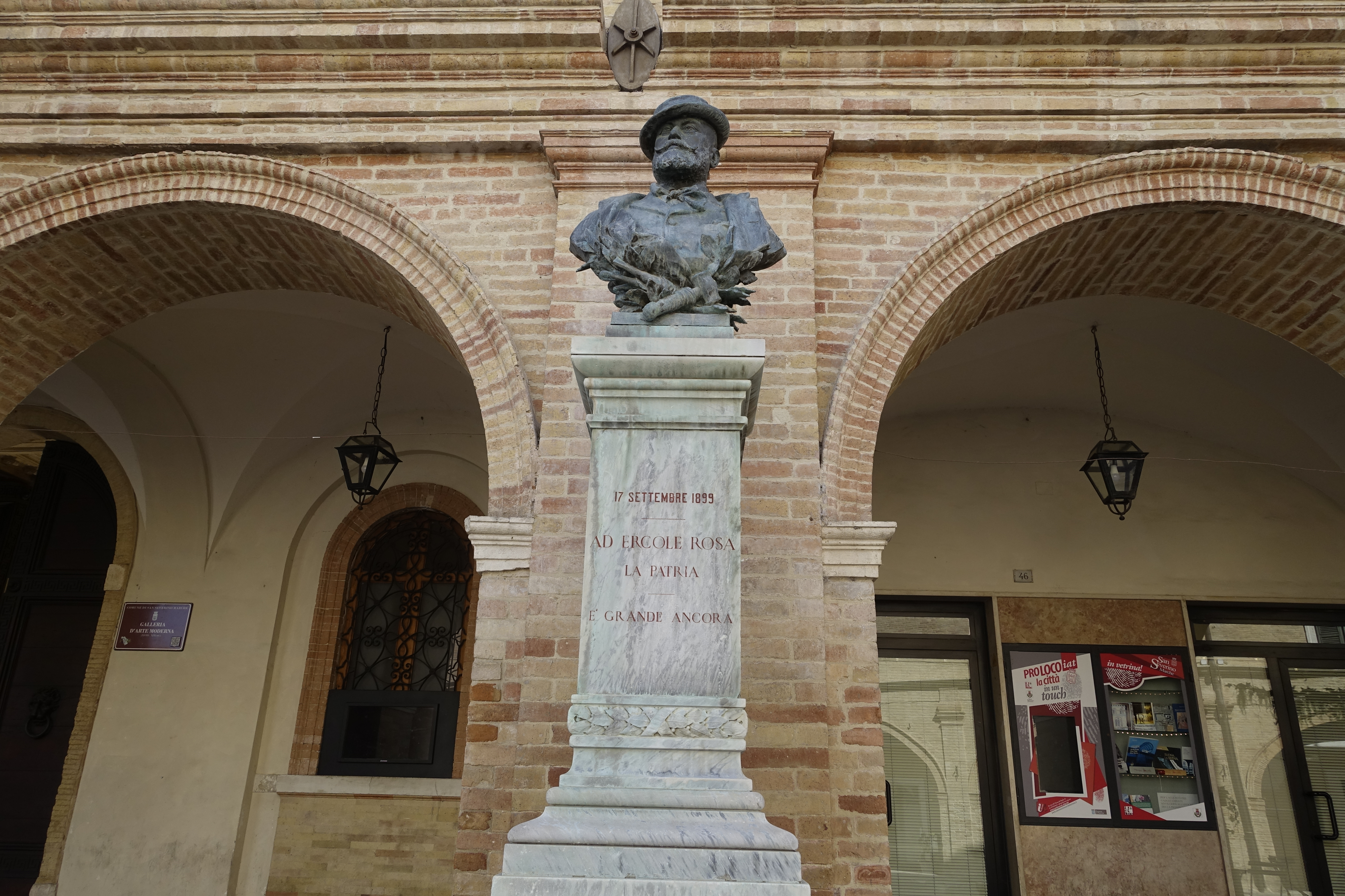 Busto di Ercole Rosa a San Severino Marche